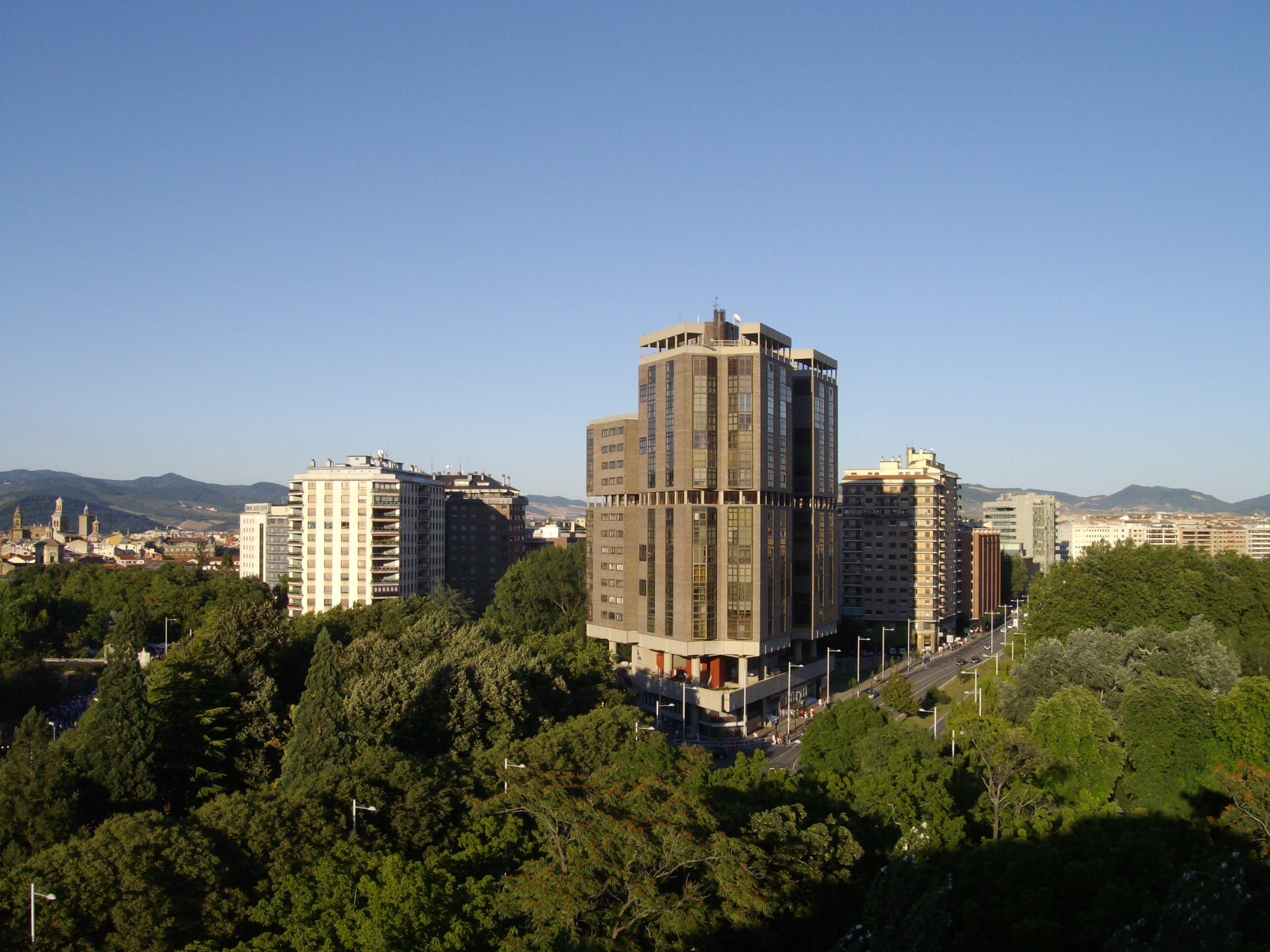 Edificio Singular